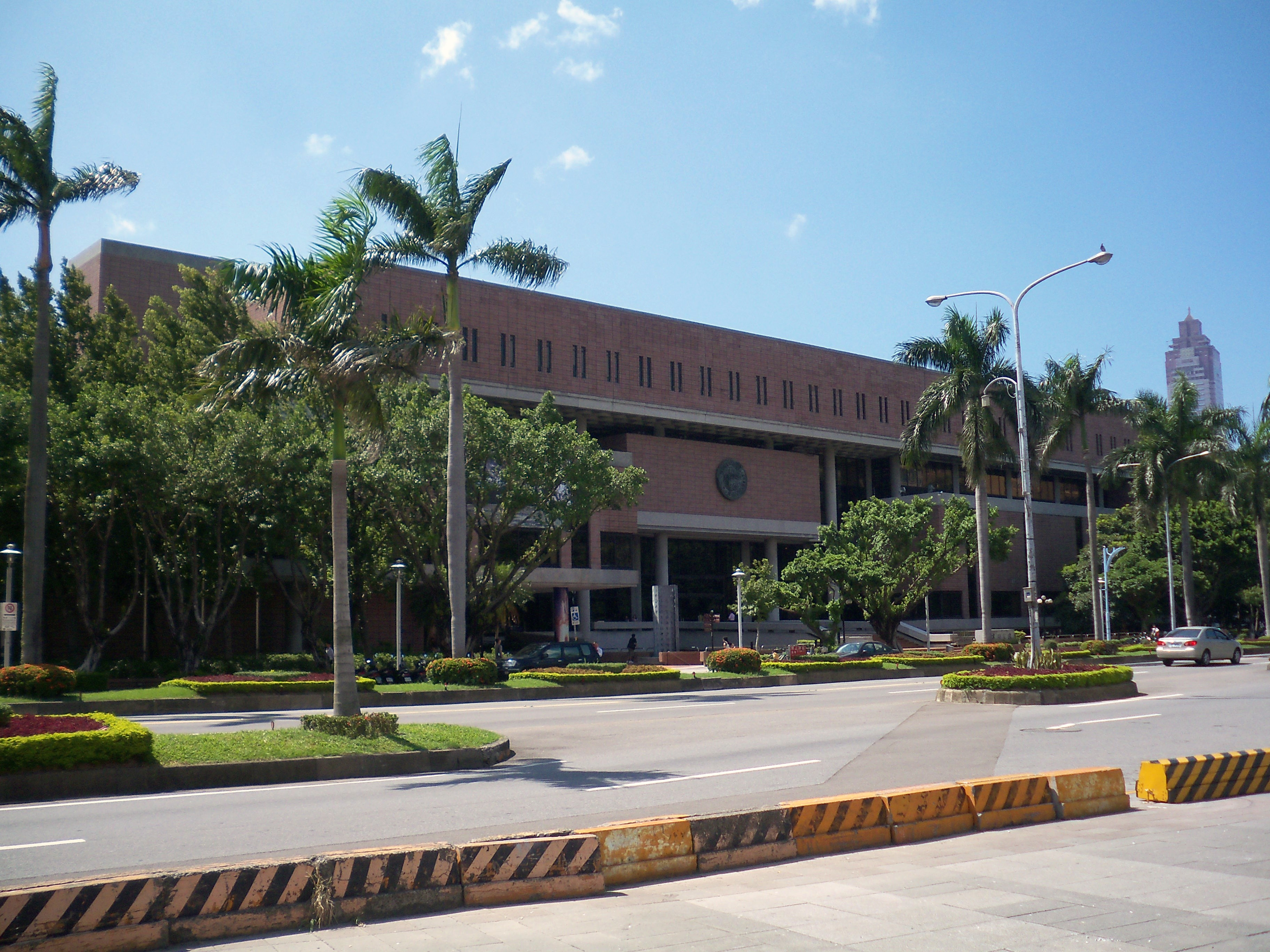 台湾・台北市の国家図書館総館。